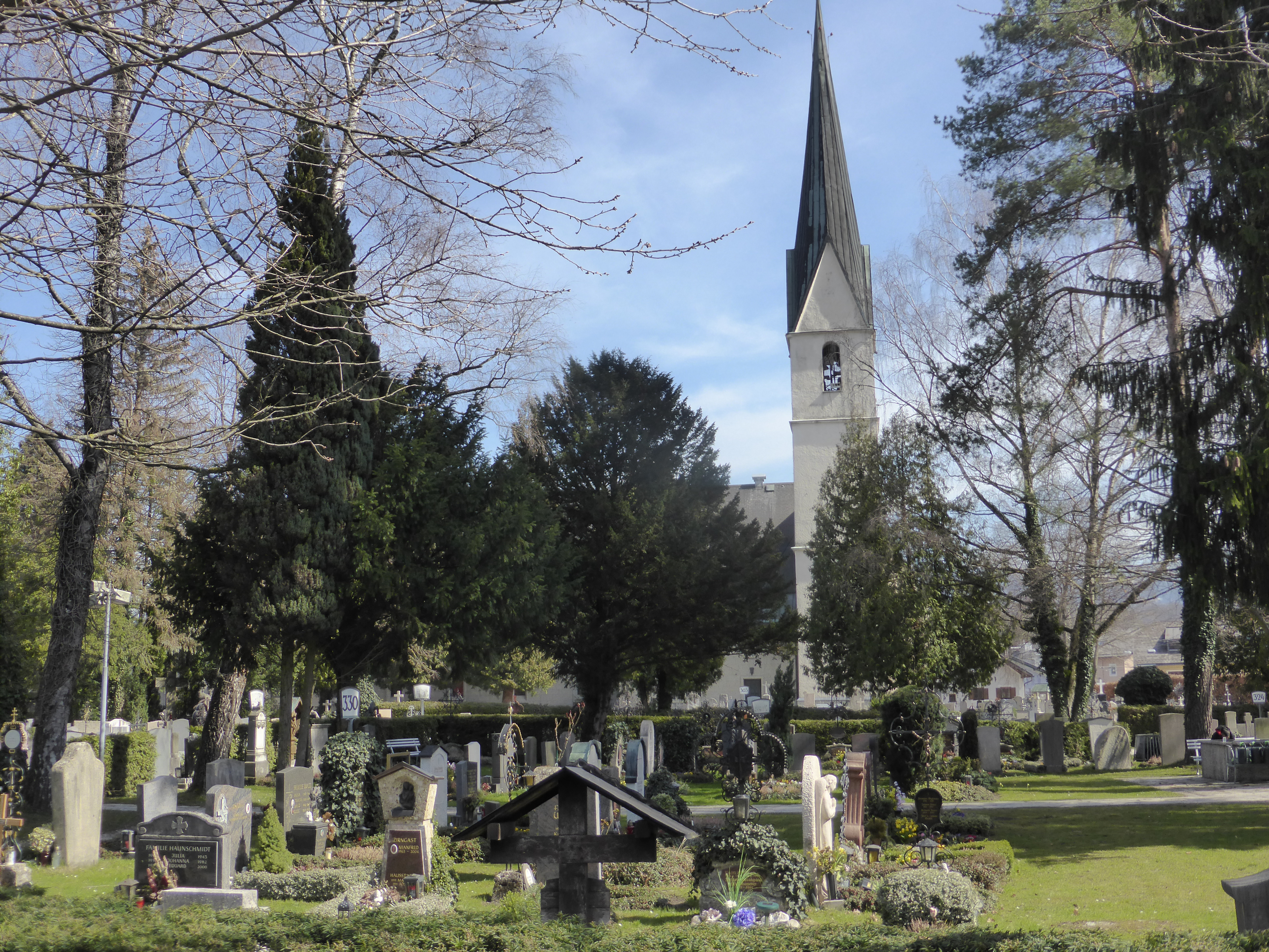 Kath. Pfarrkirche Maxglan, hl. Maximilian und alter Friedhof